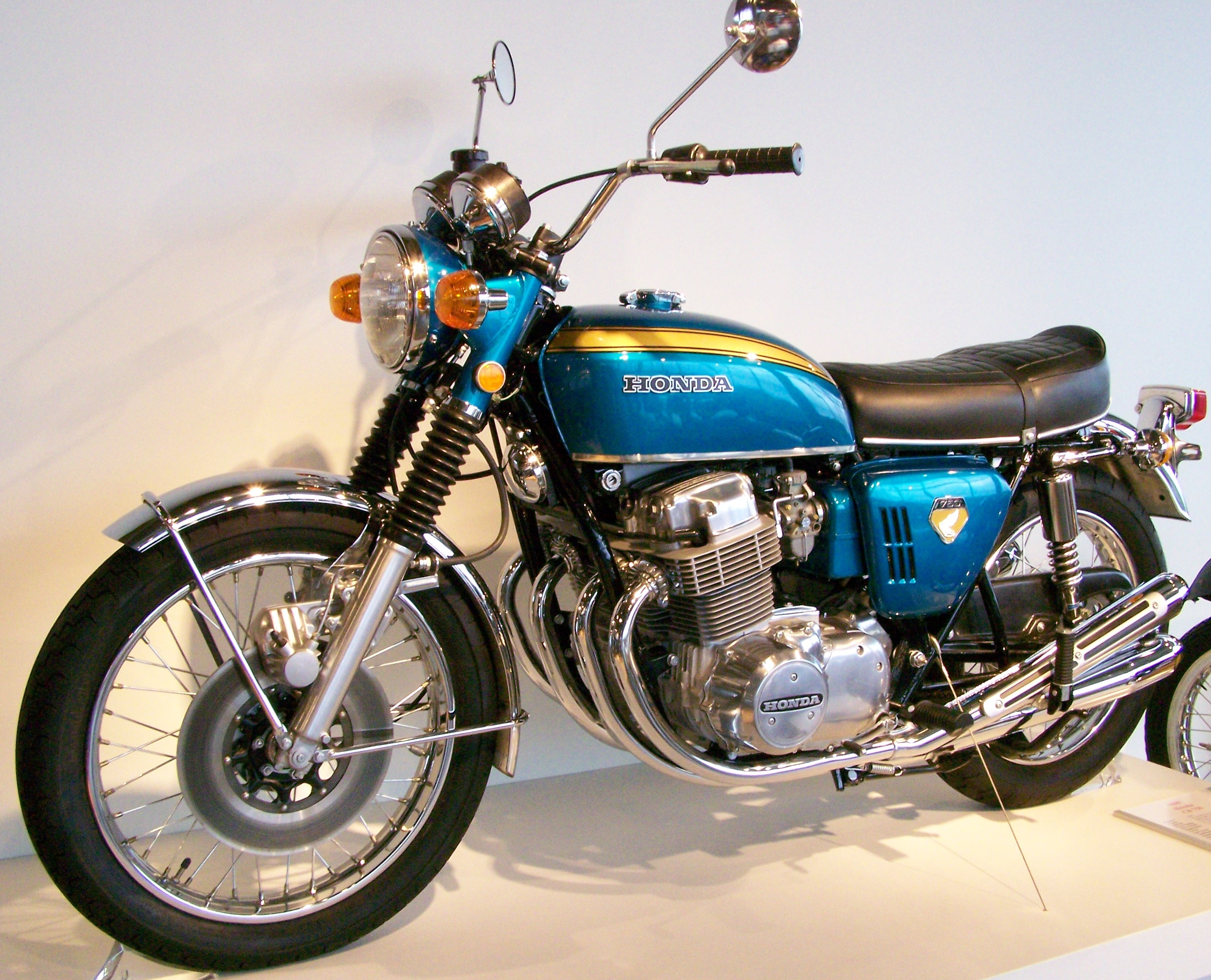 Barber Vintage Museum_89 Honda CB750four